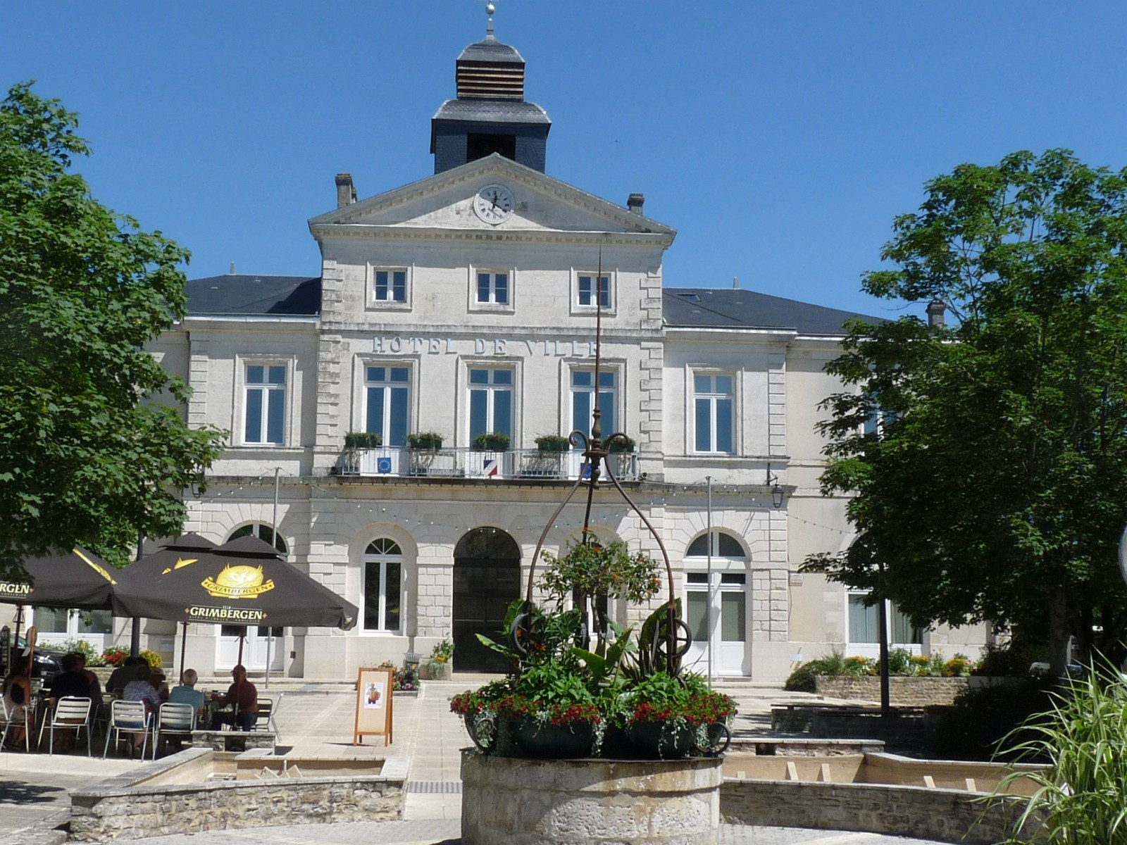 Hôtel de ville, Ruffec, Charente, France